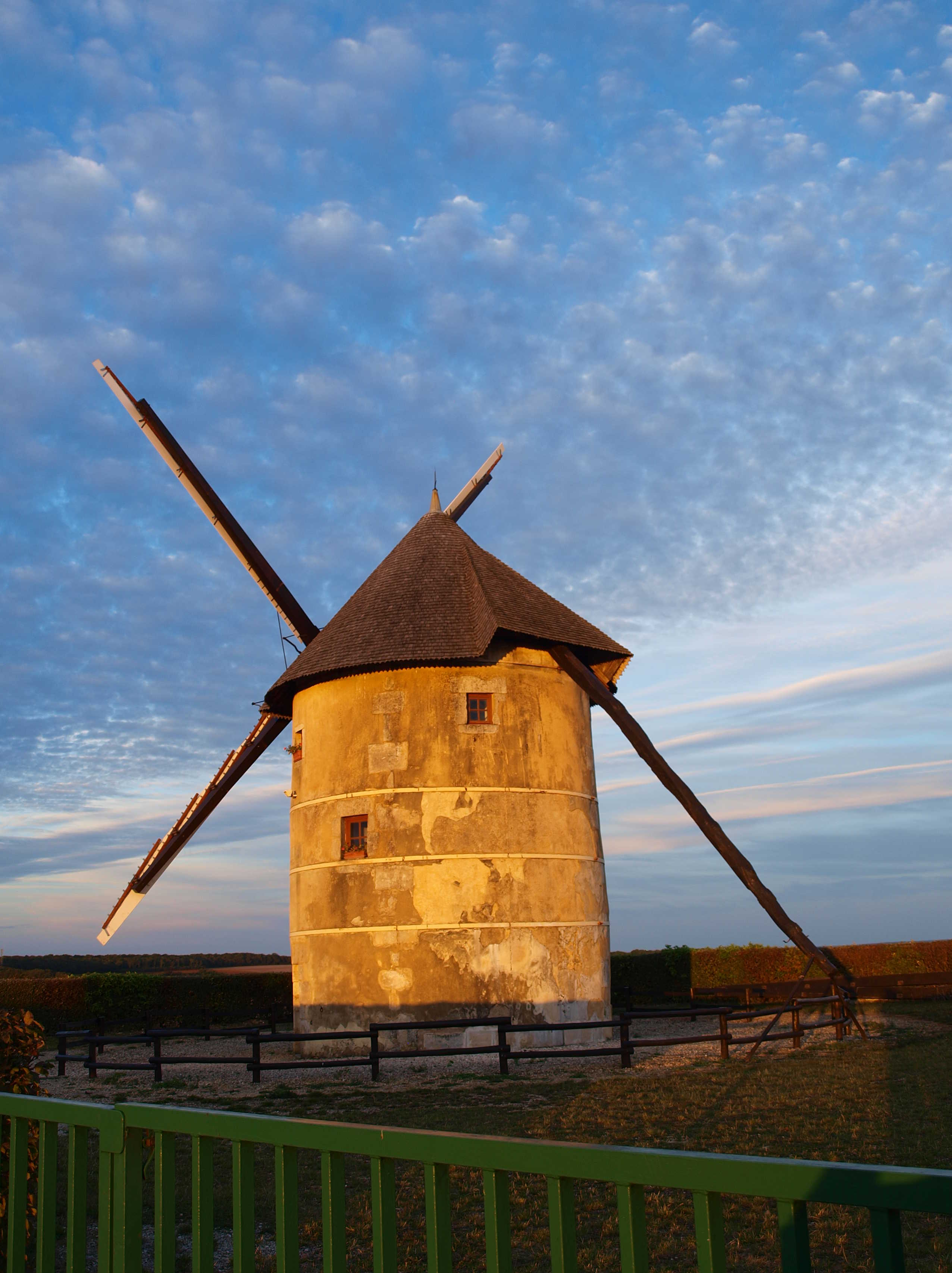 Migé (Yonne, France) ; le moulin